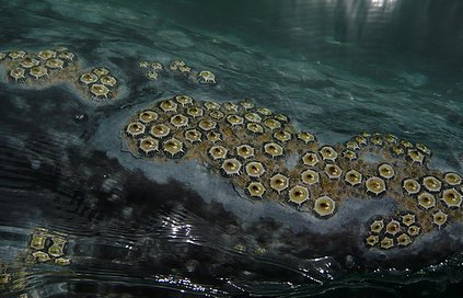 Percebes (Cryptolepas rhachianecti) sobre una balena grisa a Laguna Ojo de Liebre (Baixa Califòrnia Sud, Mèxic)